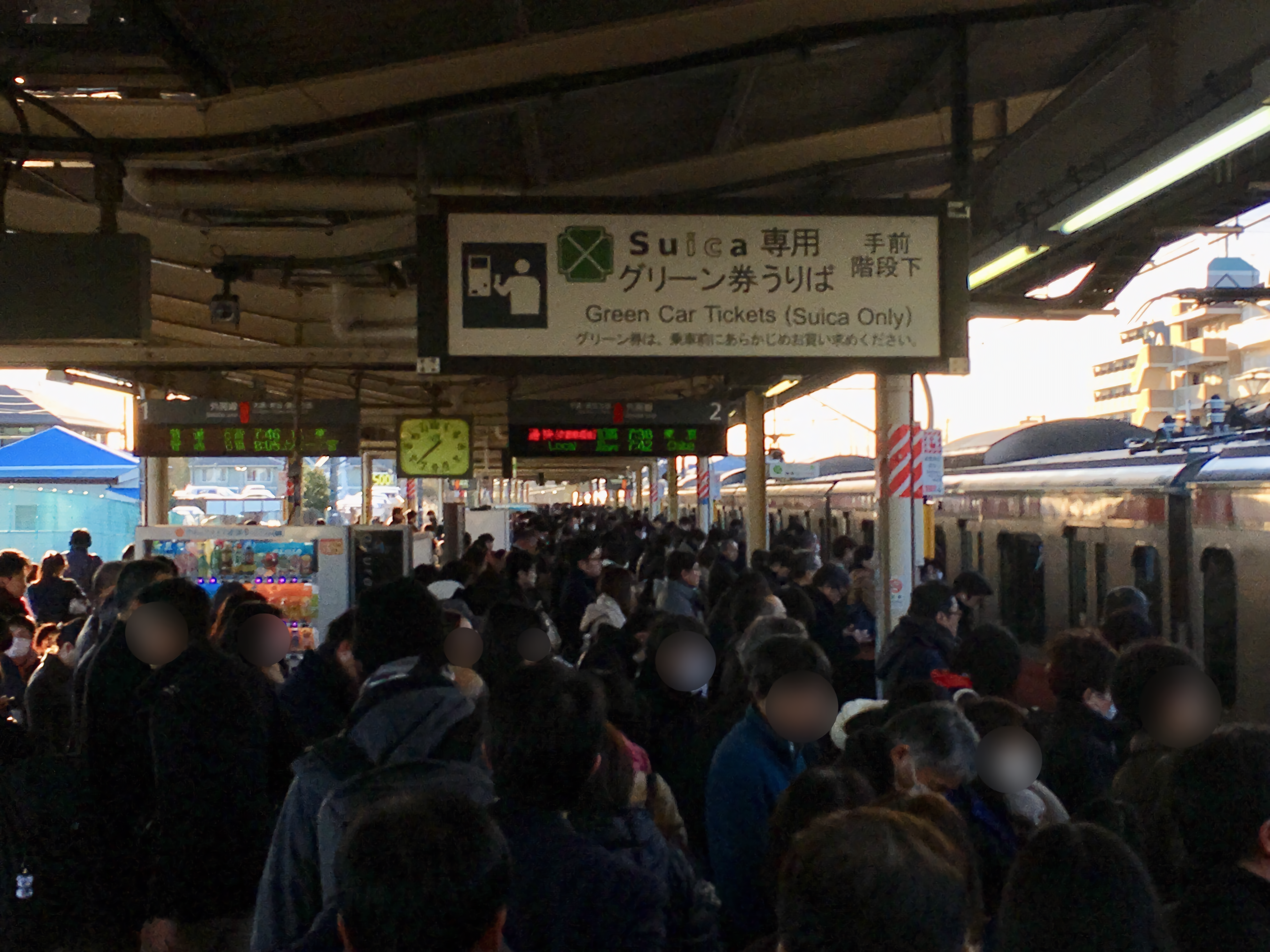 鎌取駅の通勤ラッシュ時のホーム